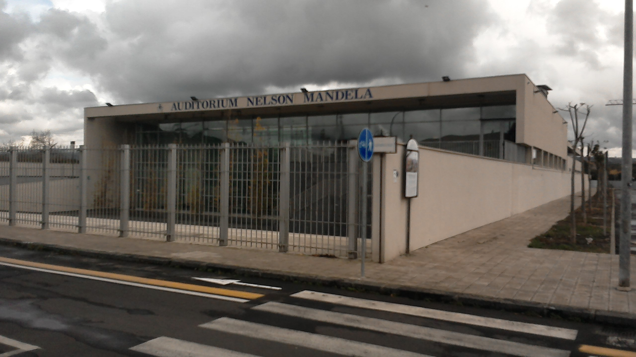 L'auditorium Nelson Mandela - Misterbianco